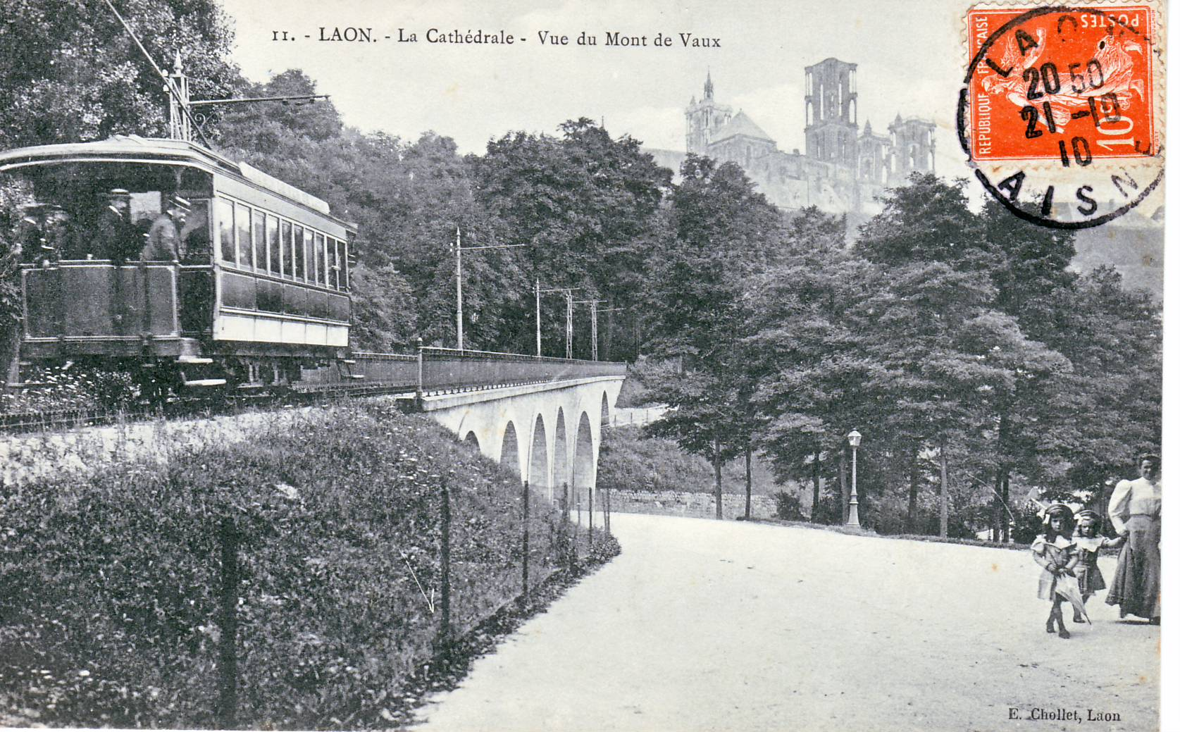 Carte postale ancienne éditée par E. Chollet à Laon, n°11 :LAON - La Cathédrale - Vue du Mont de Vaux